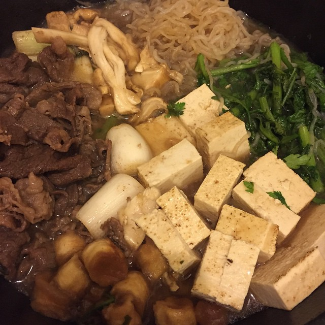 Sukiyaki (Kansai style) with Matsutake 松茸入り関西式 #すき焼き